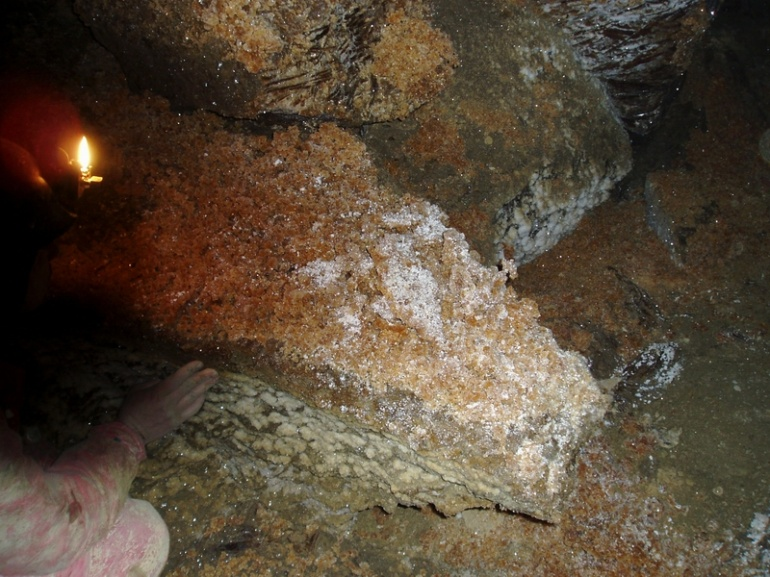 Печера «Оптимістична», Борщівський район, с. Королівка, Шупарськел-во, кв. 2 в. 7, лісове урочище «Королівка»